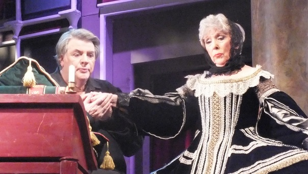 7\1\12,гастроли театра Сатиры в Санкт-Петербурге